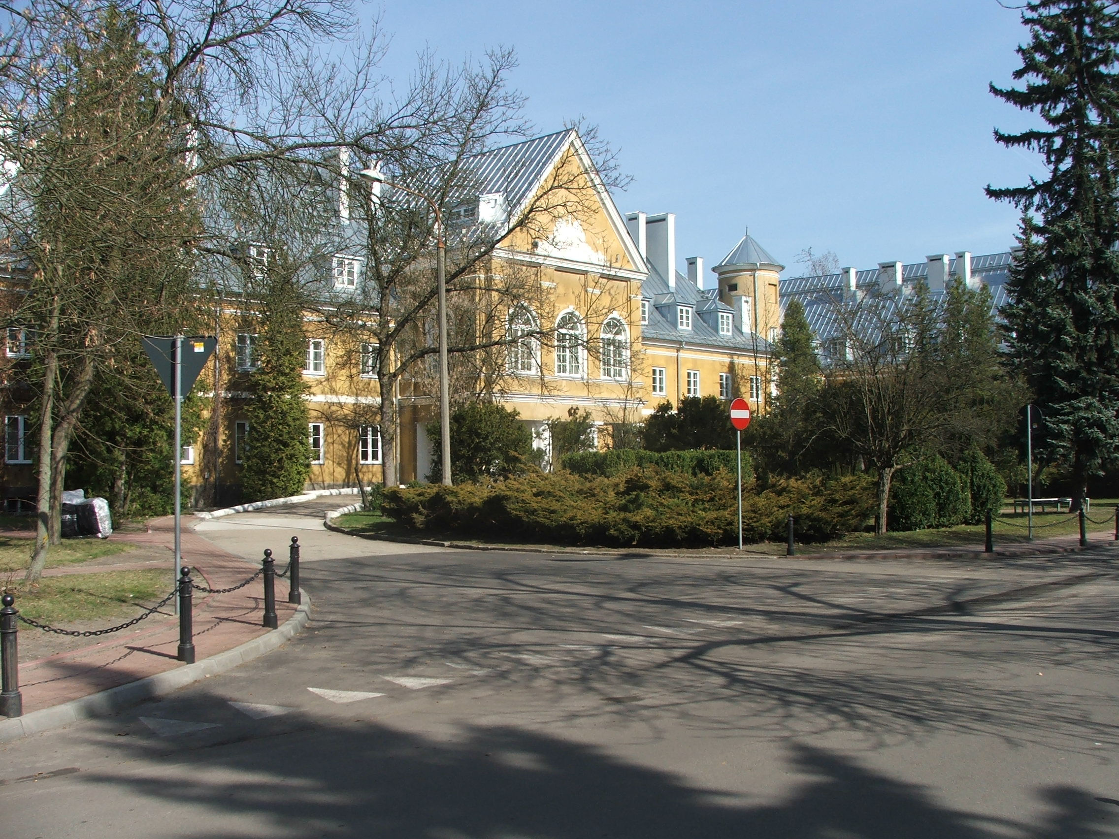 Budynek nr 14 Akademii Sztuki Wojennej